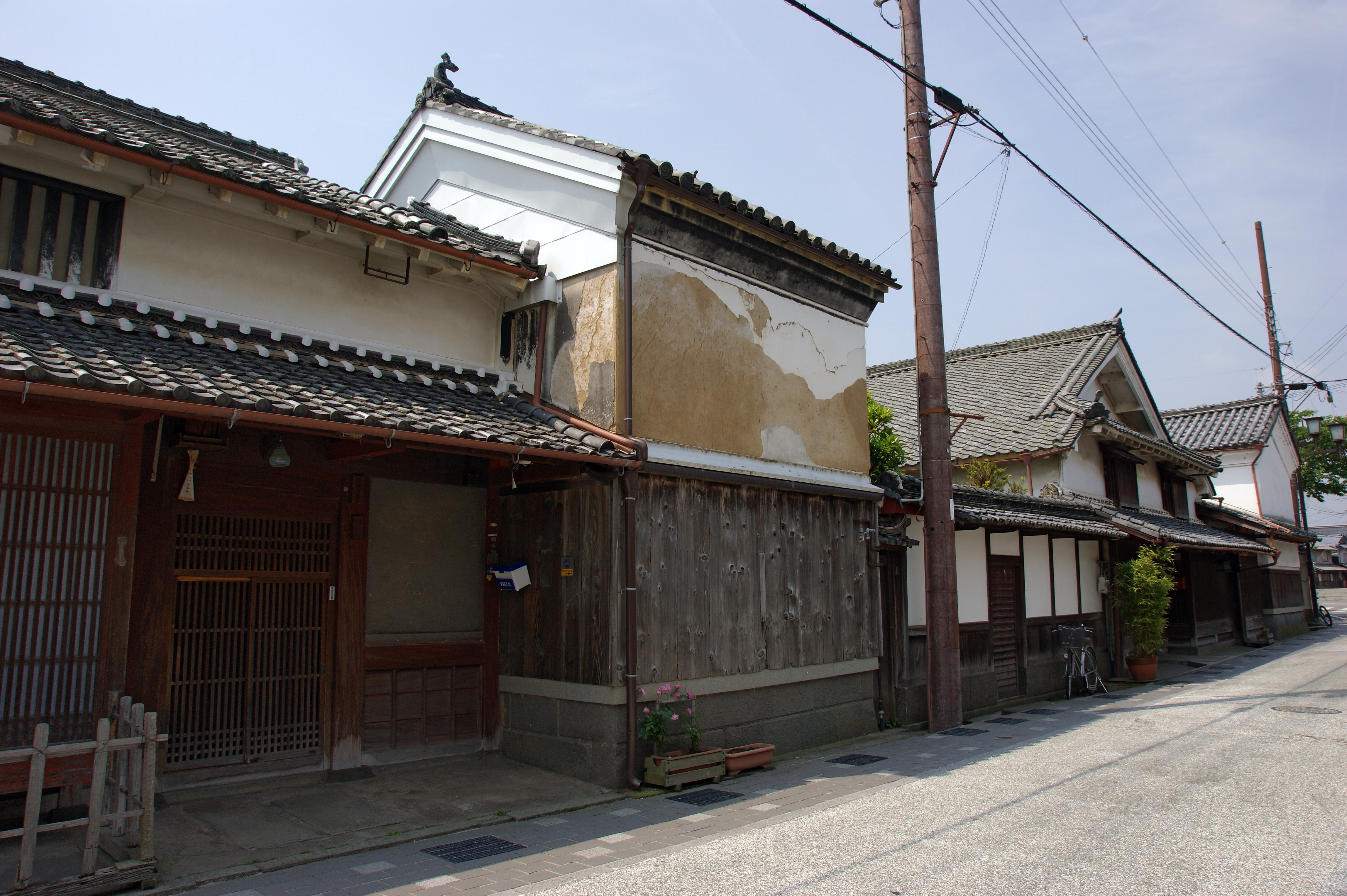 Kwara-machi in Sasayama, Hyogo prefecture, Japan